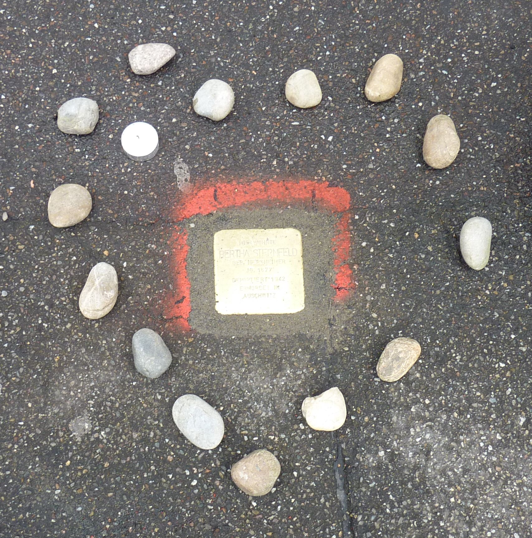 Stolperstein für Bertha Sternfeld in der Gymnasiumstraße Heilbronn kurz nach der Verlegung